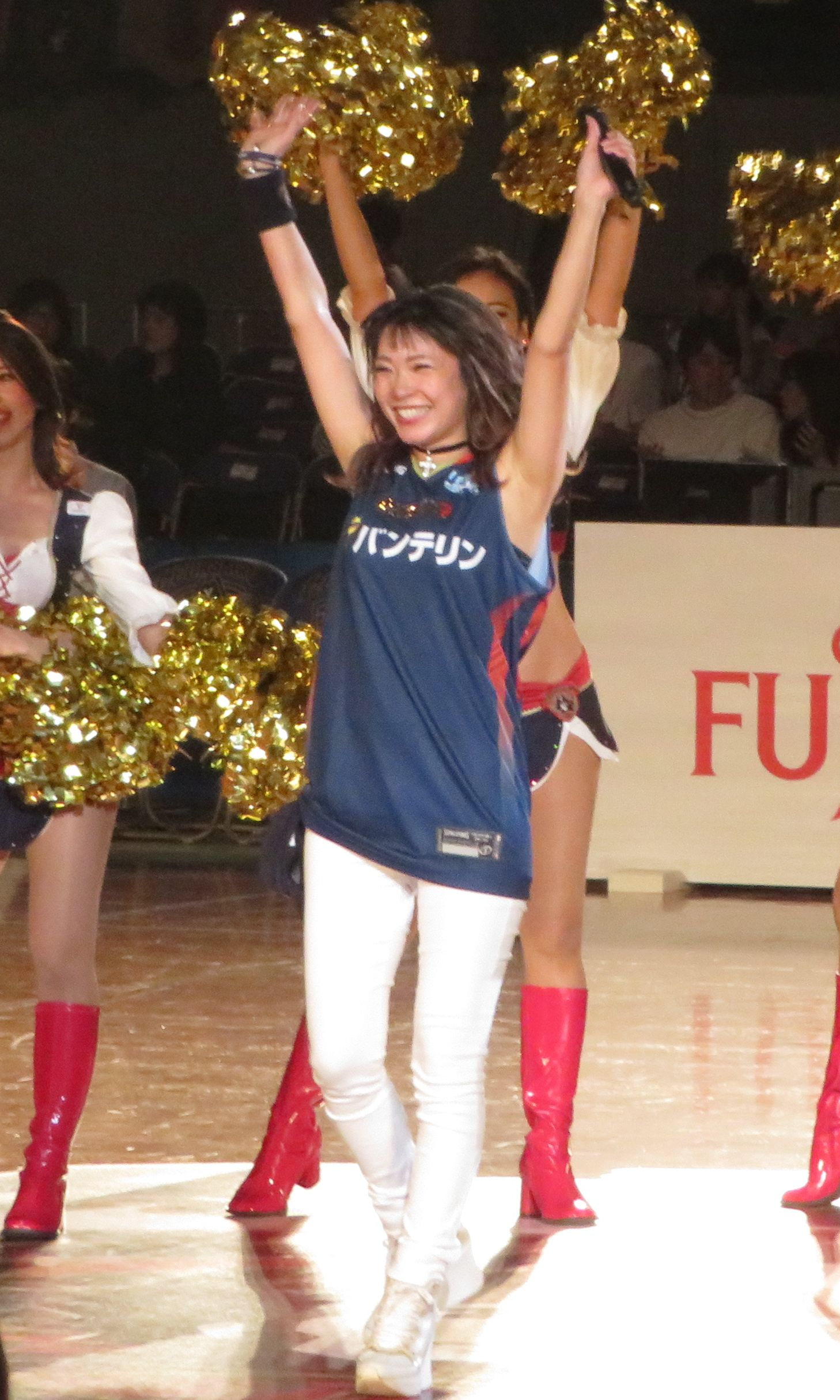 2018年10月18日撮影 2018-19 B1 第3節 横浜-富山 横浜文化体育館にて